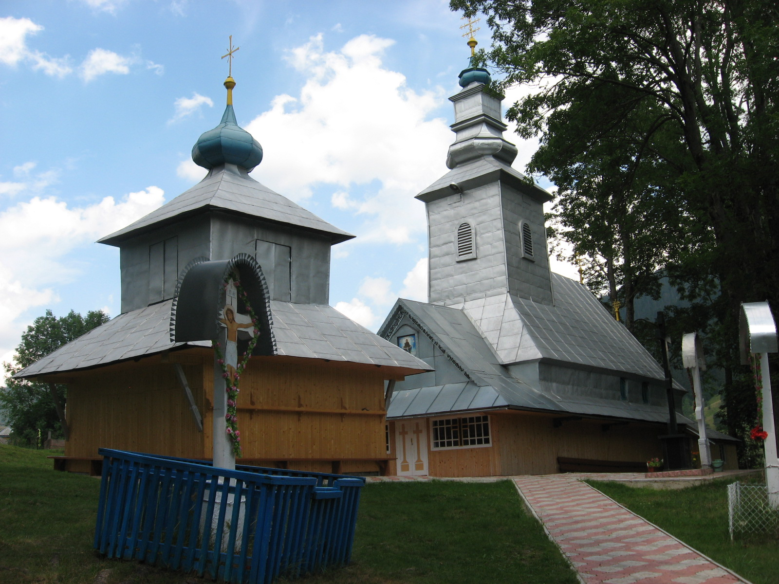 Покровська церква і дзвіниця (на передньому плані) в Синевирській Поляні